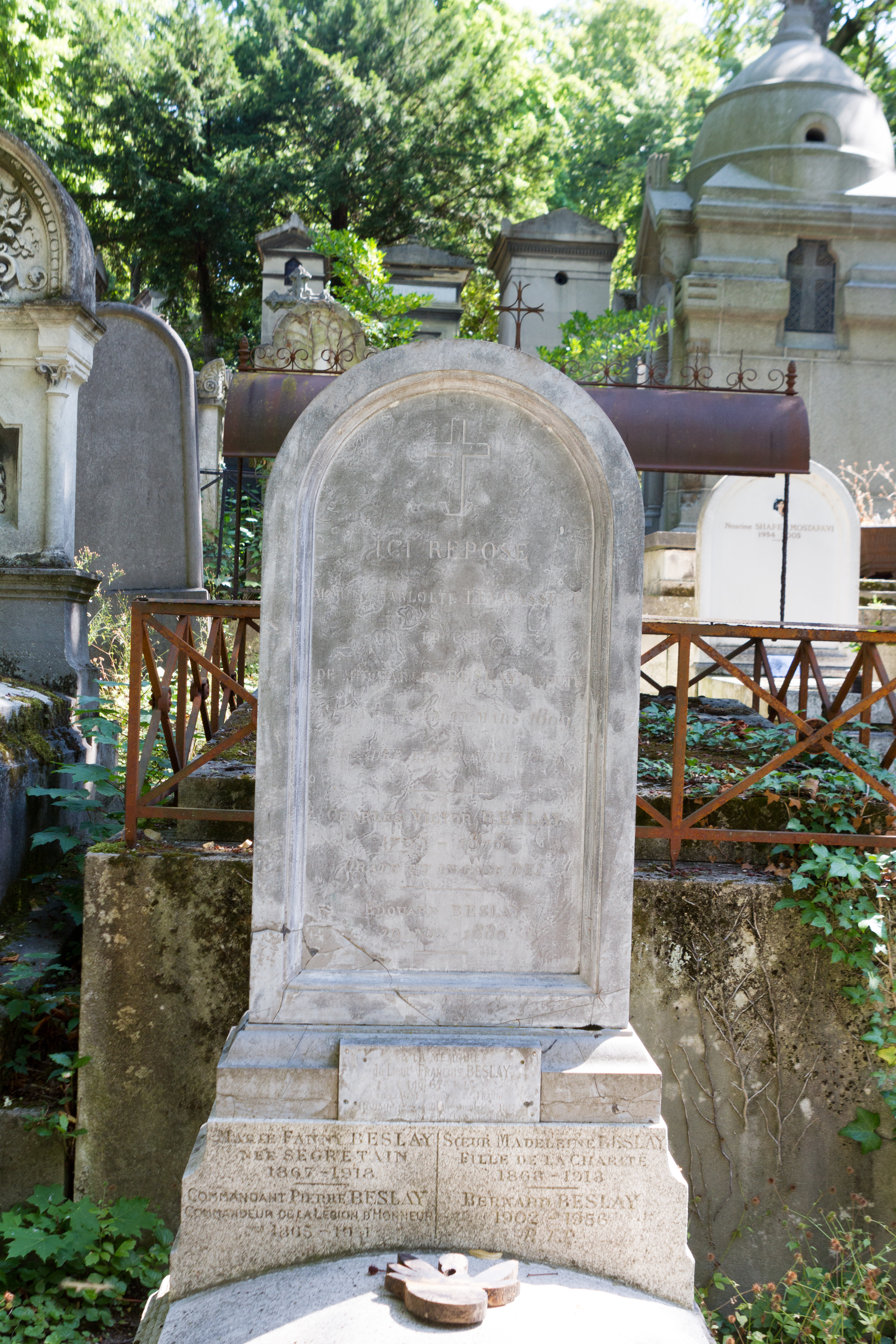 Sépulture de Charles Beslay (1795-1878), personnalité de la Commune de Paris dont il est le doyen d'âge, député du Morbihan.